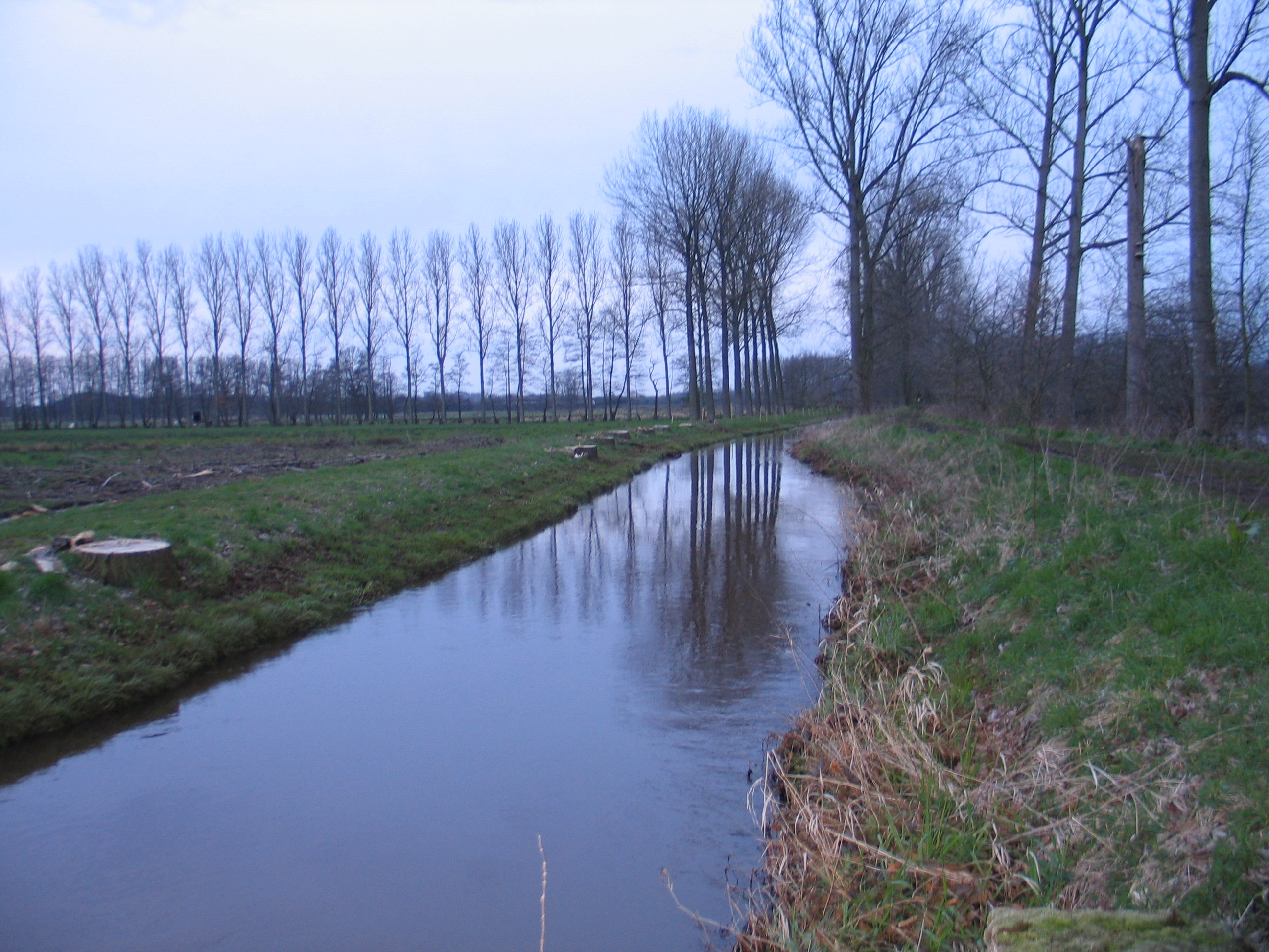 De Mangelbeek in Lummen, België